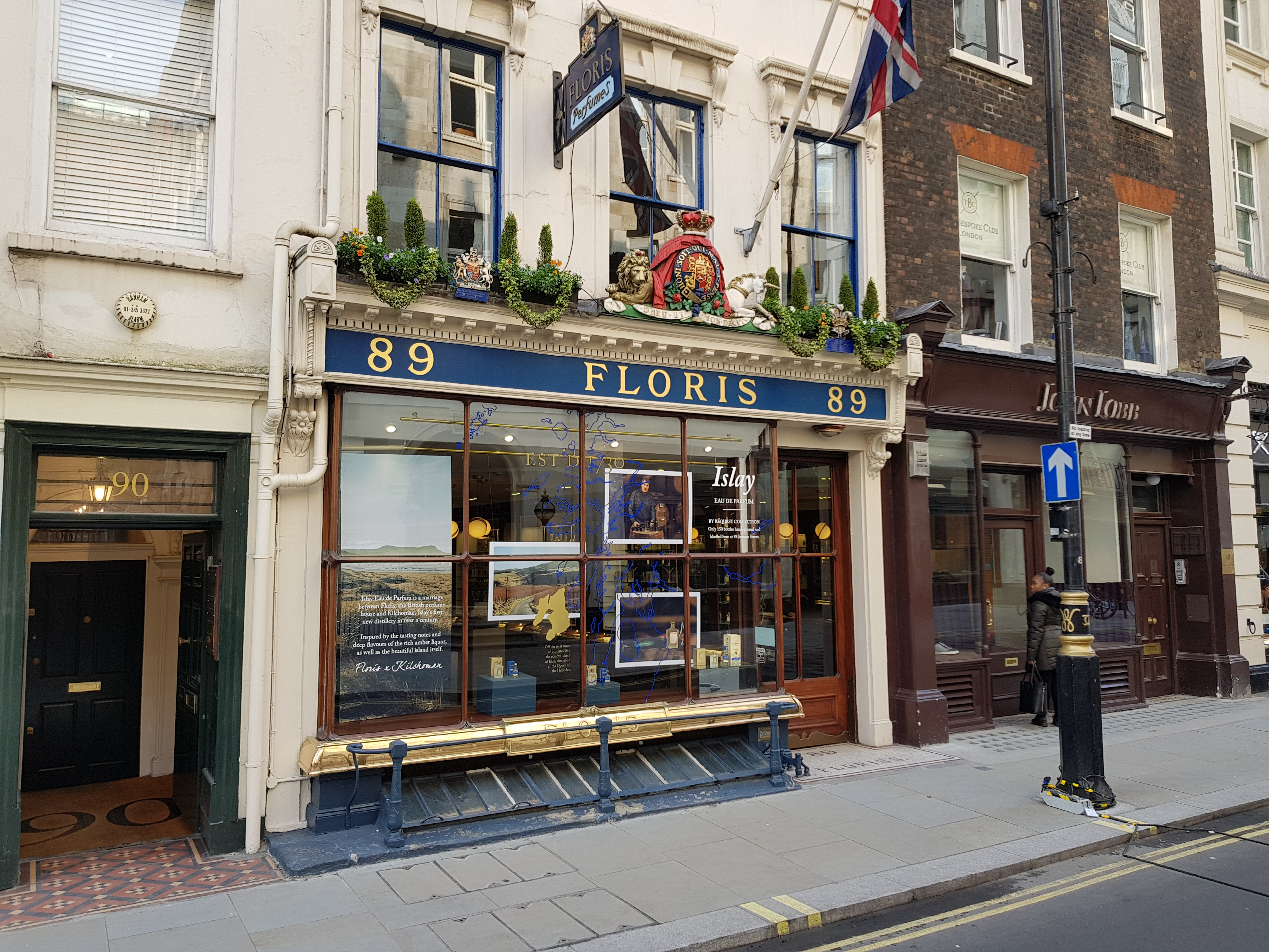 Magasins de Jermyn Street, Londres.